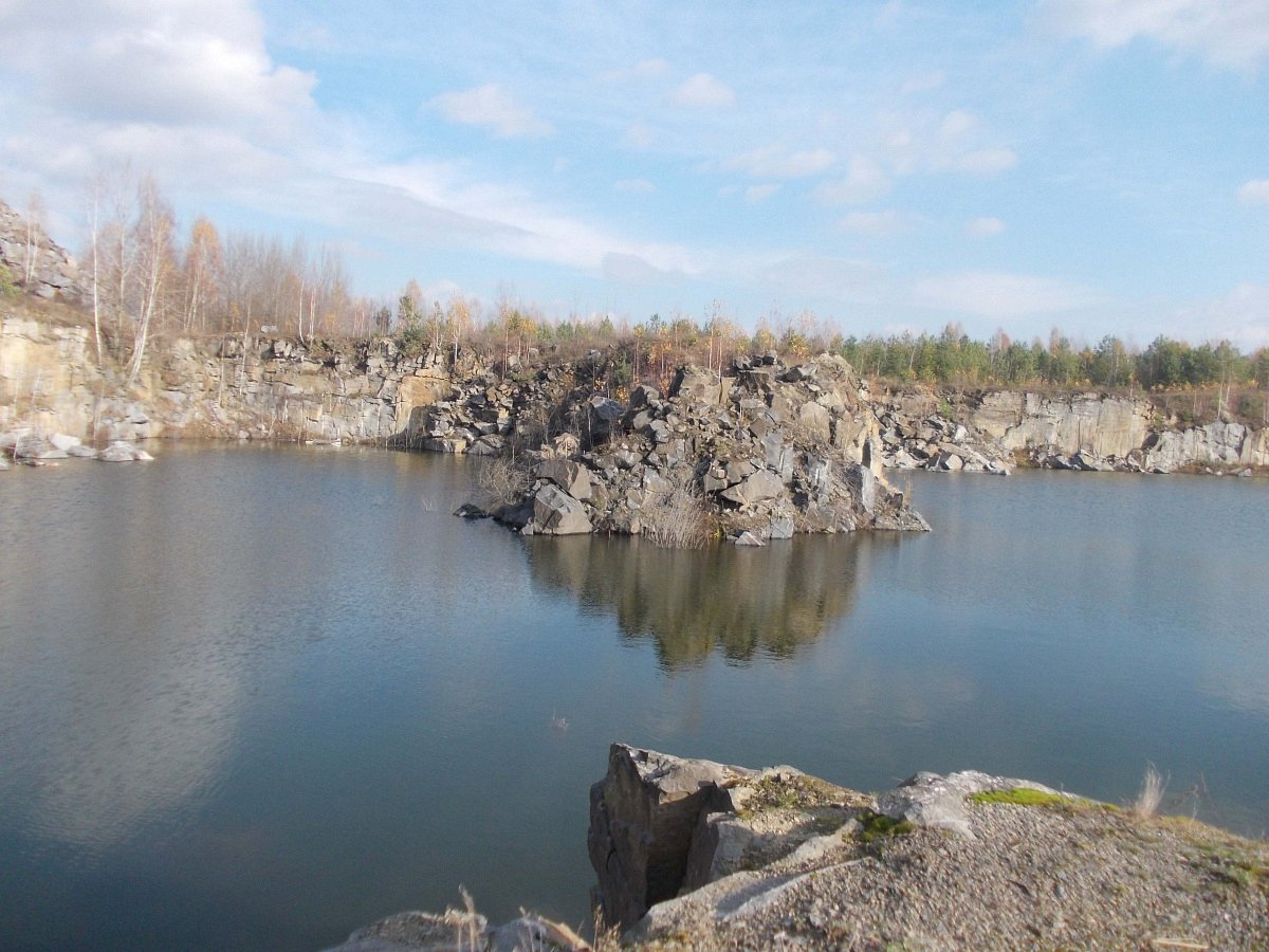 Глушкавічы. Глушкавіцкае радовішча буданіўчага камнею